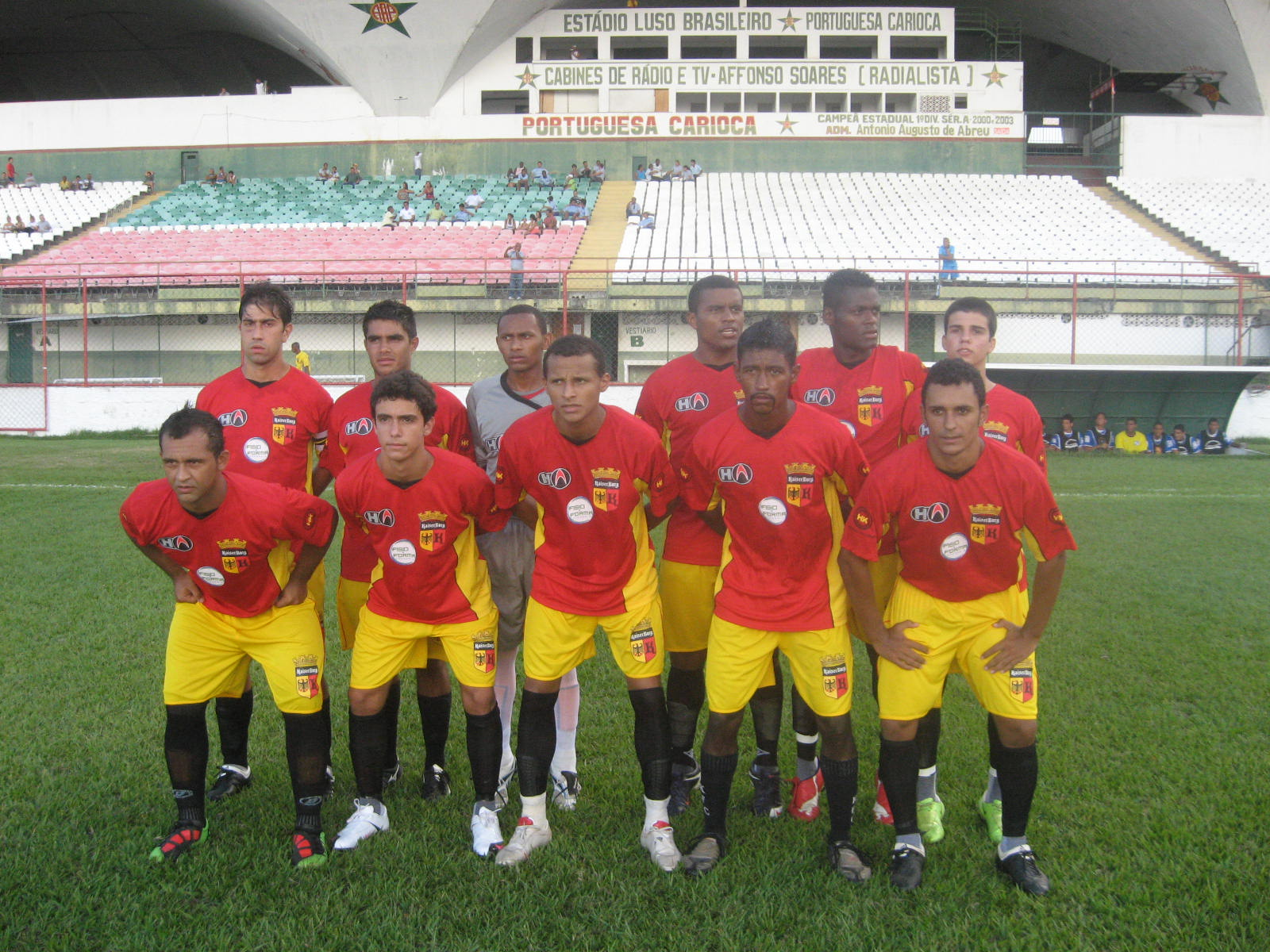 Equipe profissional do Kaiserburg Futebol Clube, que disputa o Campeonato Estadual da Série C do Rio de Janeiro, em foto clicada no estádio Luso-Brasileiro.